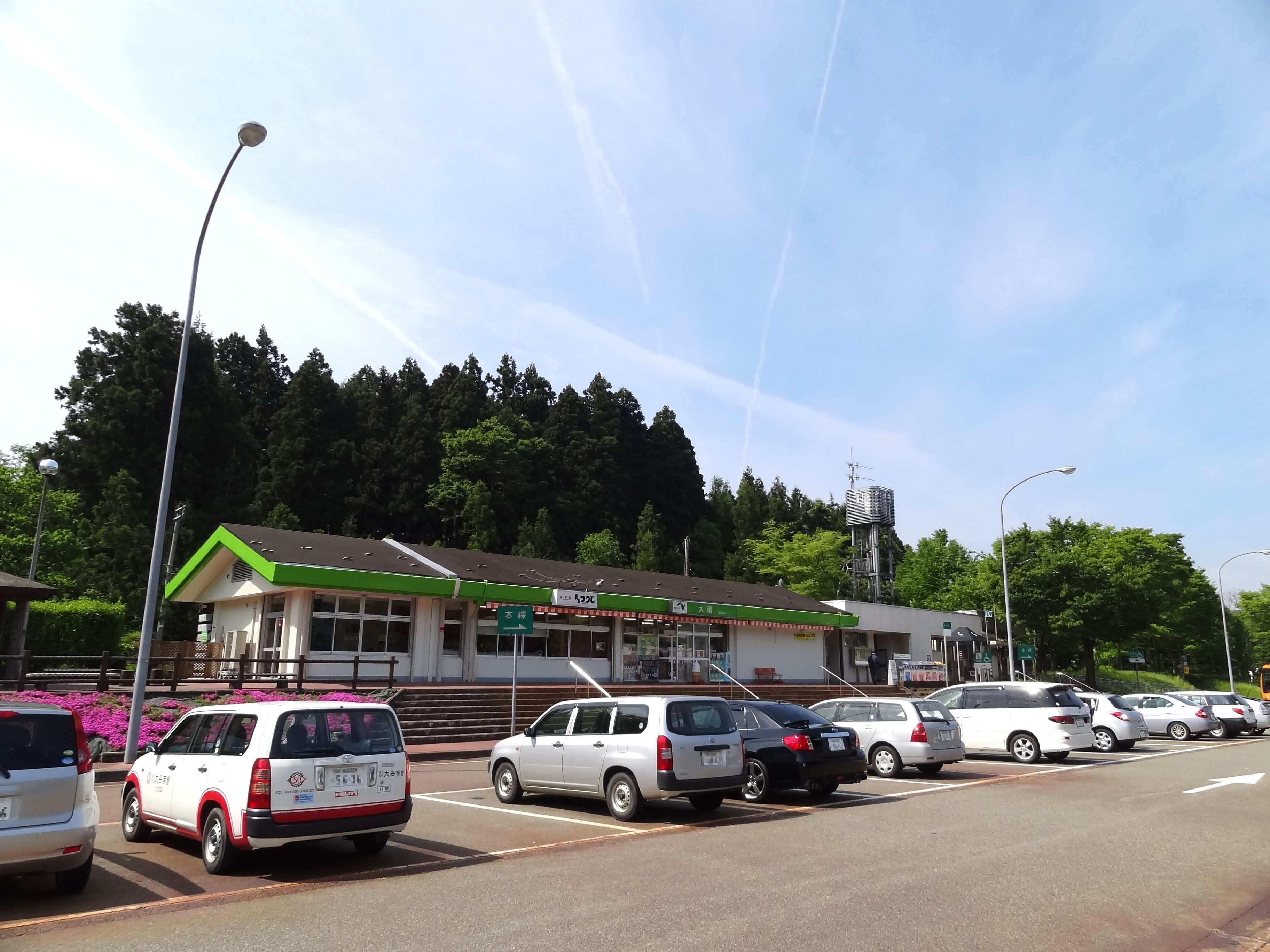 北陸自動車道 大積パーキングエリア（上り線）